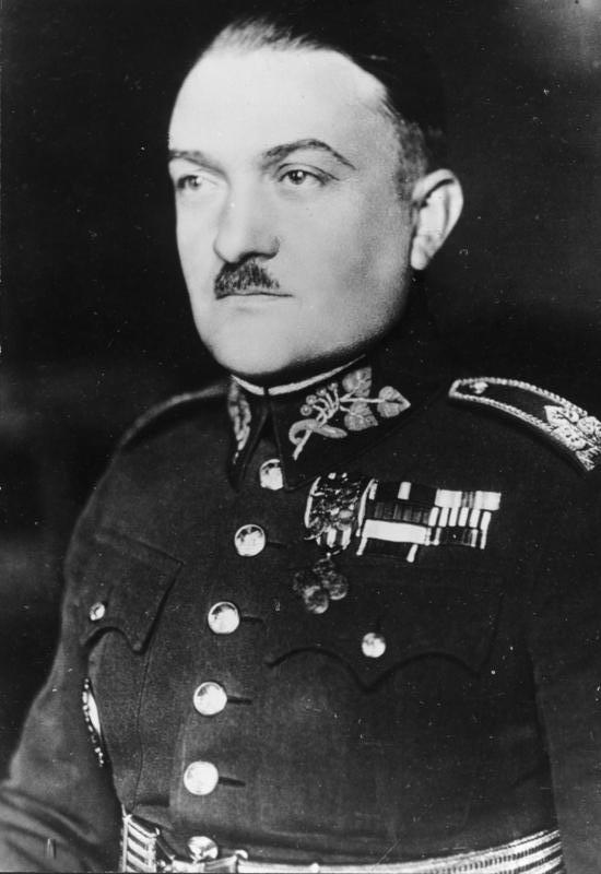 Alois Elias ADN-ZB/Archiv Divisionsgeneral Ing. Alois Elias tschechischer Ministerpräsident und Innenminister in der Zeit des faschistischen Protektorats Böhmen und Mähren. Aufn.: April 1939 [Porträt General Alois Elias] Abgebildete Personen: Eliáš, Alois Ing.: 1890-1942, General, Vorsitzender der Protektoratsregierung Böhmen und Mähren, Tschechoslowakische Republik